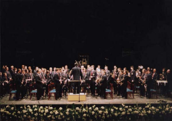 Banda de Herrera en el Teatro Cervantes